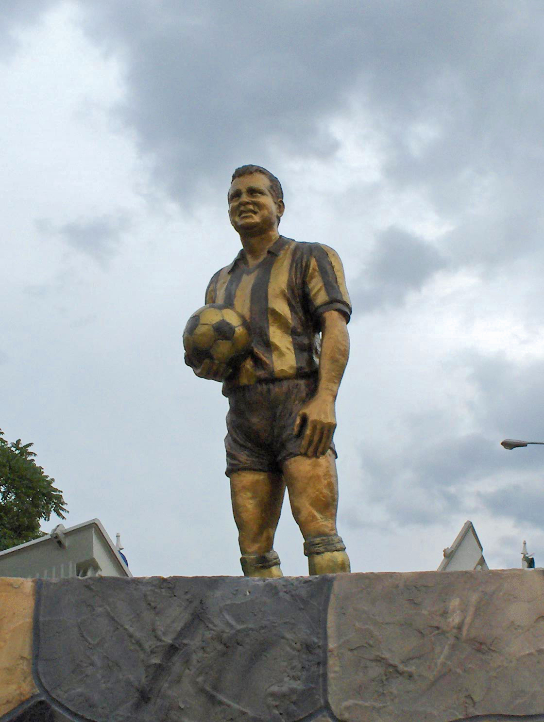 detalle escultura de William Mendez en el conjunto escultórico de LAS AMÉRICAS, en San Cristóbal, estado Táchira